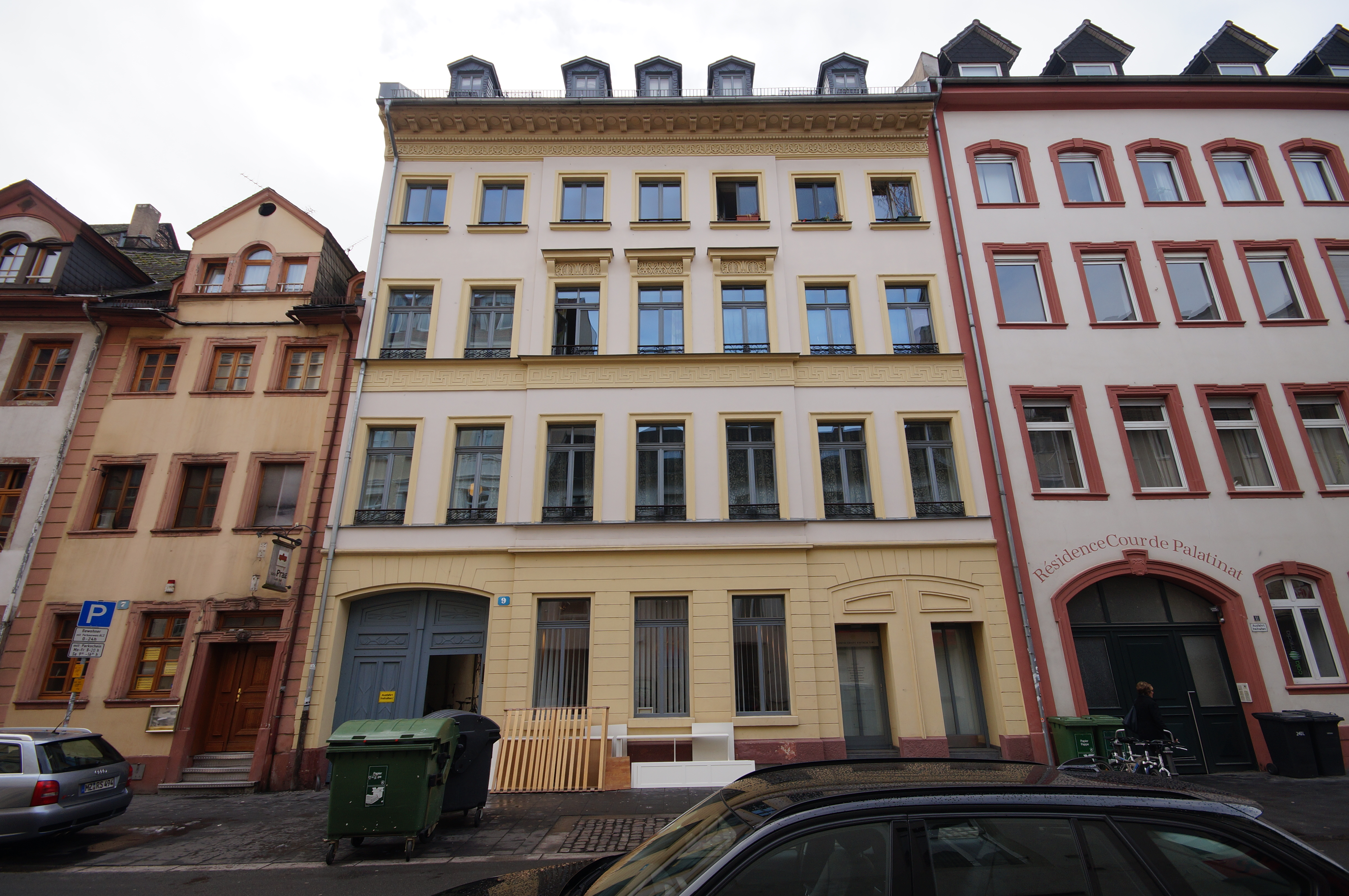 Die Fassade der Hausnummer 9 in der Neutorstraße in Mainz-Altstadt in der Denkmalzone Neutorstraße